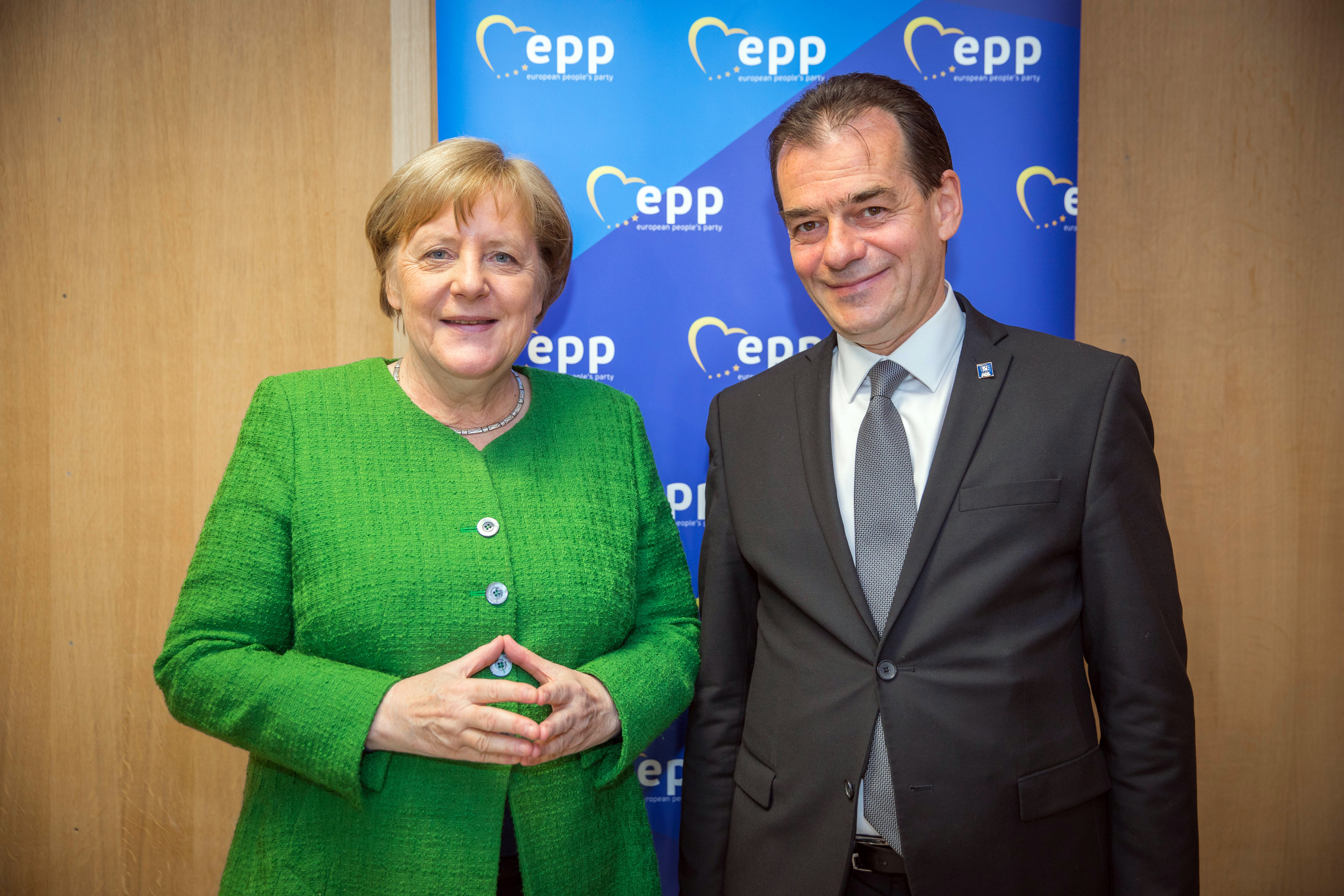 EPP Summit, Sibiu, May 2019